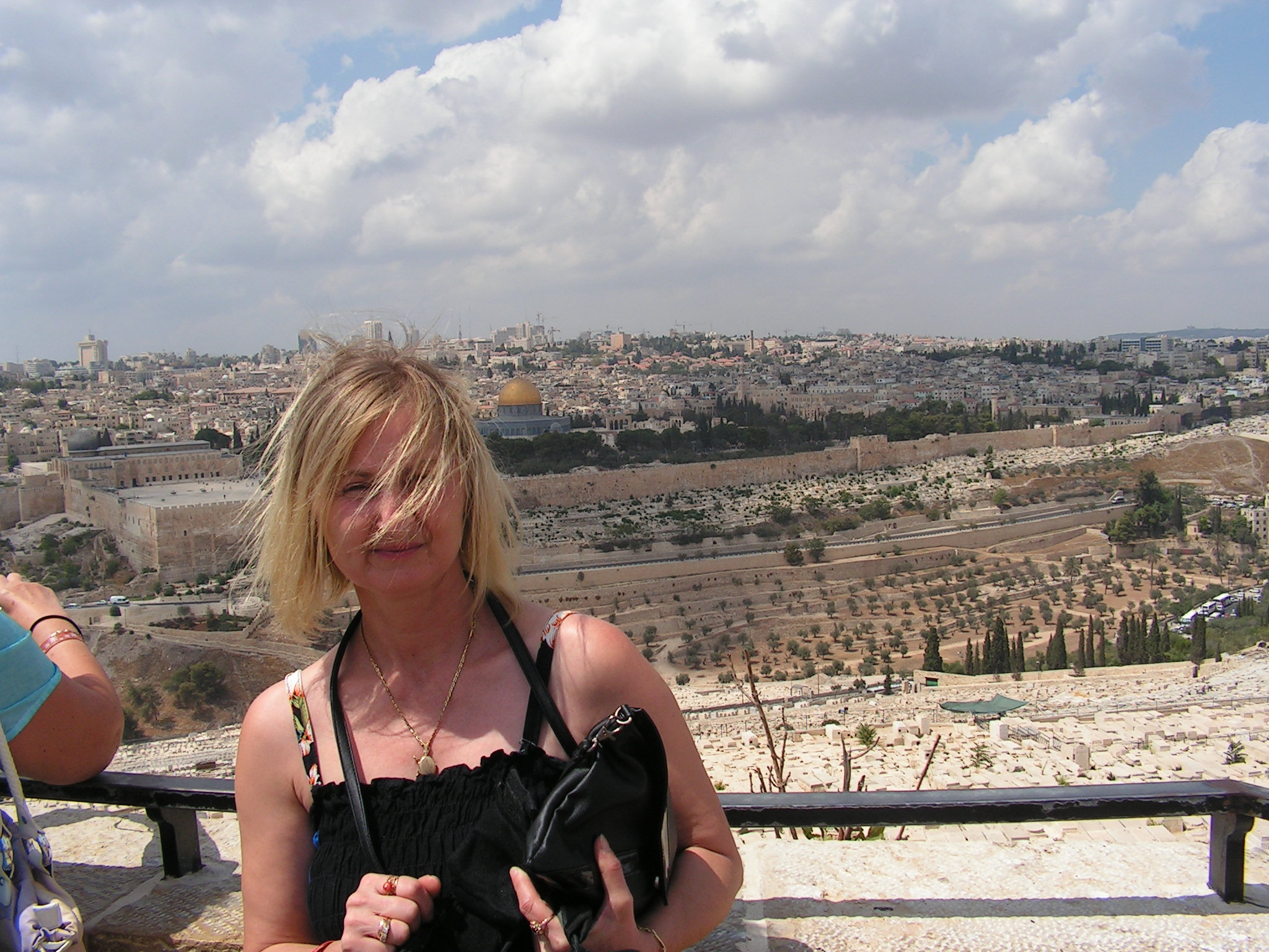 Na wycieczce w Jerozolimie